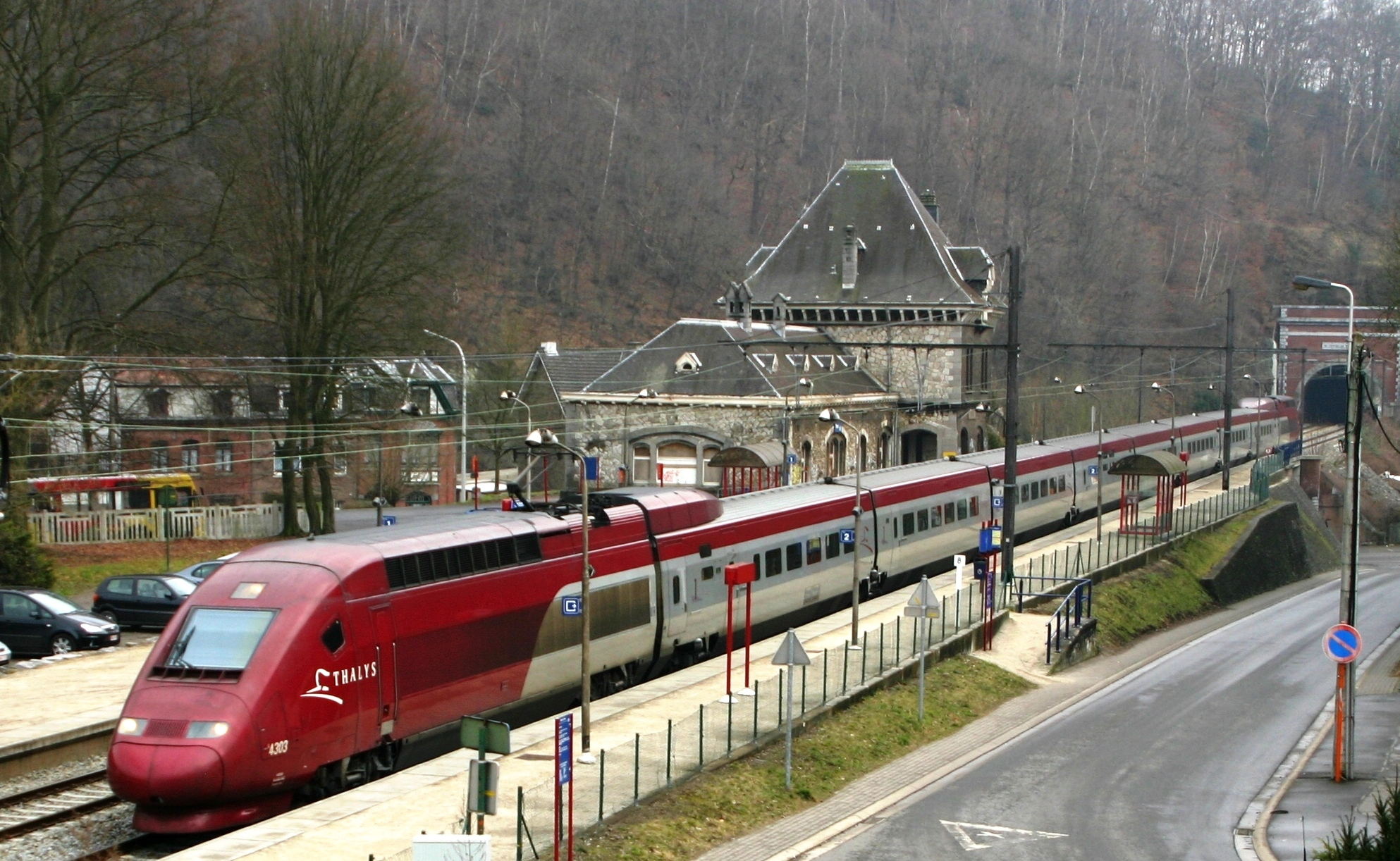 Den Thalys an der Gare zu Trooz.